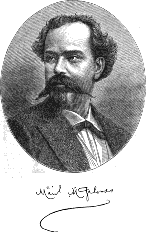 Retrato de Manuel M. Flores